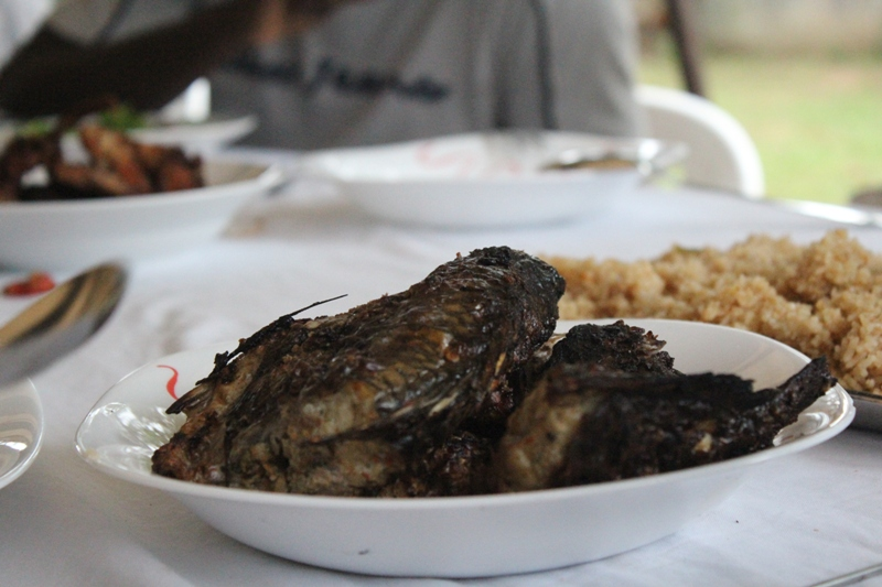 poisson carpe braisé aux épices frais